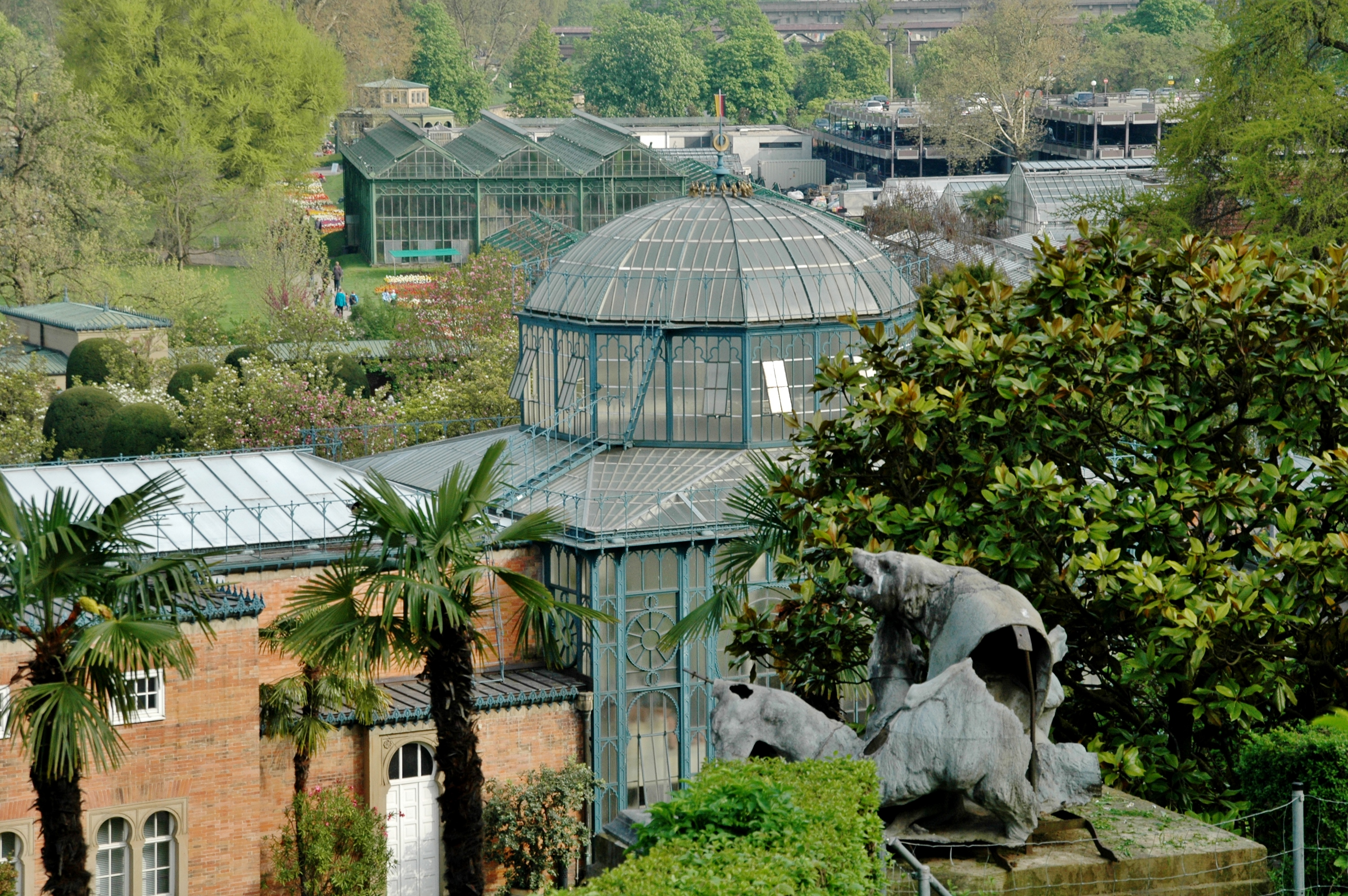 Wilhelma, ein zoologischer und botanischer Garten in Stuttgart